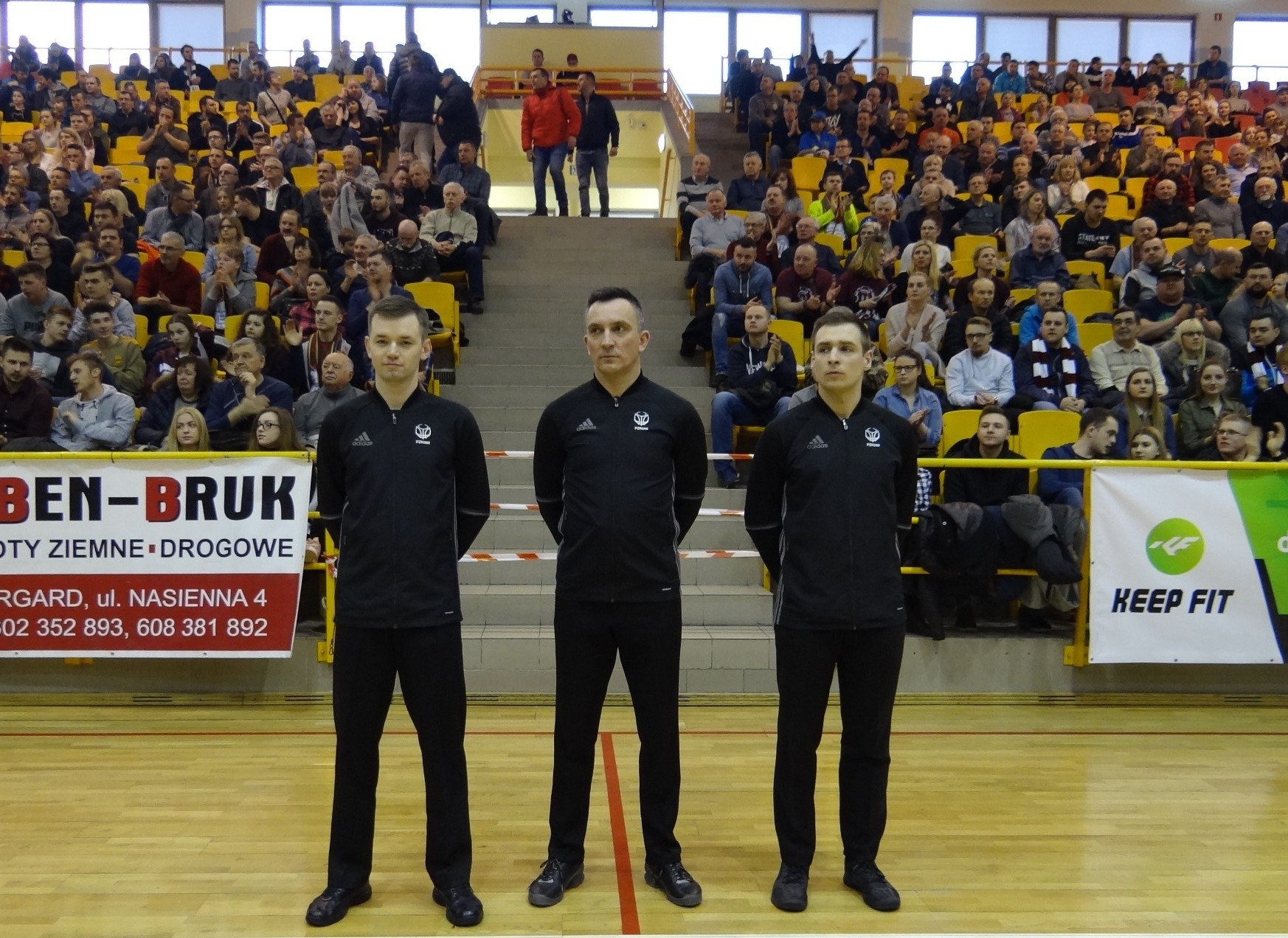 Sędziowie meczu Spójnia SKK Siedlce